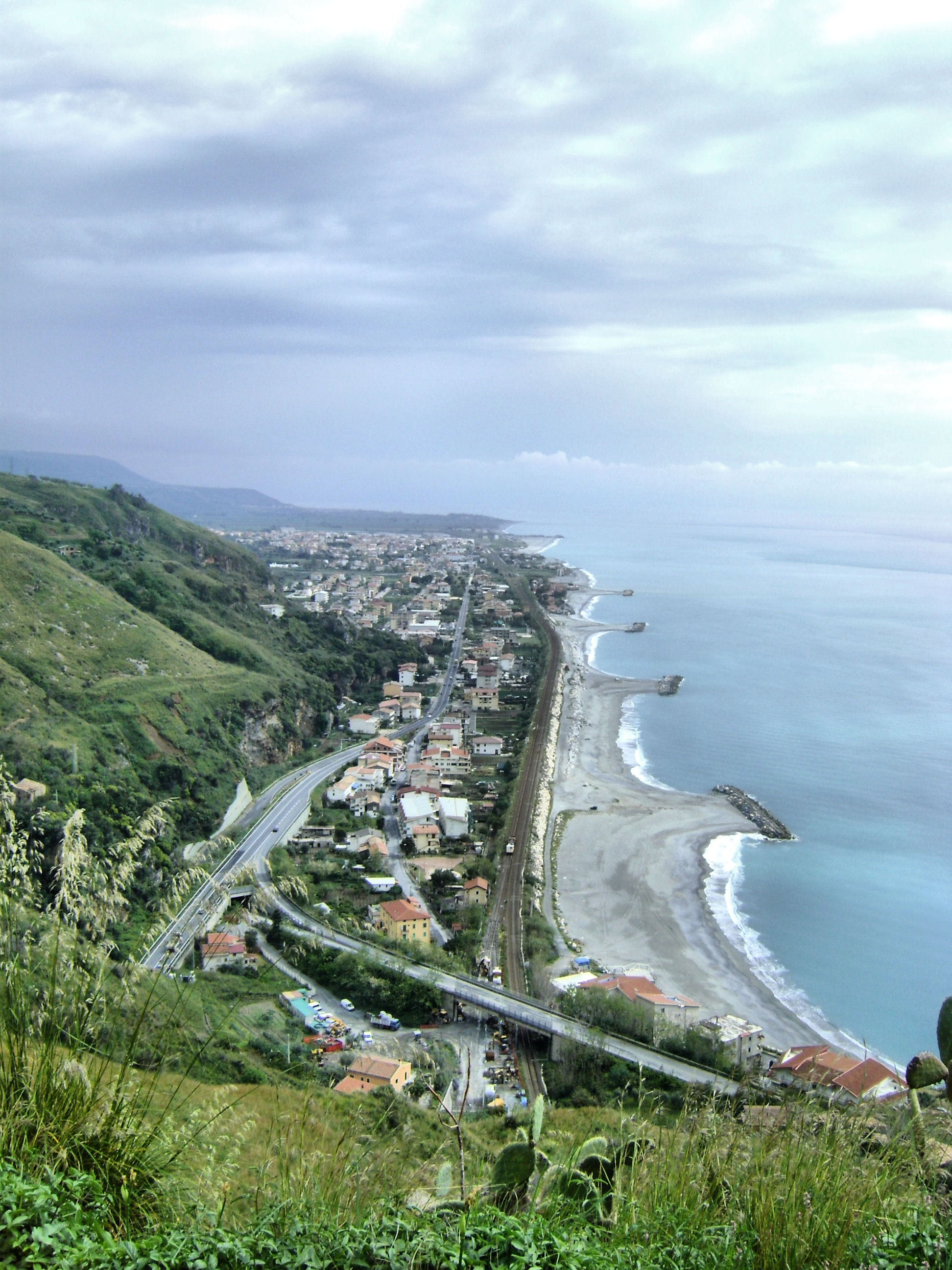 Io sottoscritto Luigi Salvatore Vadacchino, utente di Wikipedia sotto il nome di Lodewijk Vadacchino, cedo l'immagine HPIM01899.jpg a Wikimedia Italia, sotto licenza CC-BY-SA, con il nome Campora_San_Giovanni_09_-_Panarama_Barrio_Stritture.jpg. L'Immagine fotografica raffigura la mia cittadina natale di Campora San Giovanni, ovvero una sua panoramica dalla località Stritture. Porgo come sempre i miei distintissimi saluti, con l'augurio che possiate venirmi a far visita. Vostro come sempre--22:09, 22 giu 2009 (CEST)